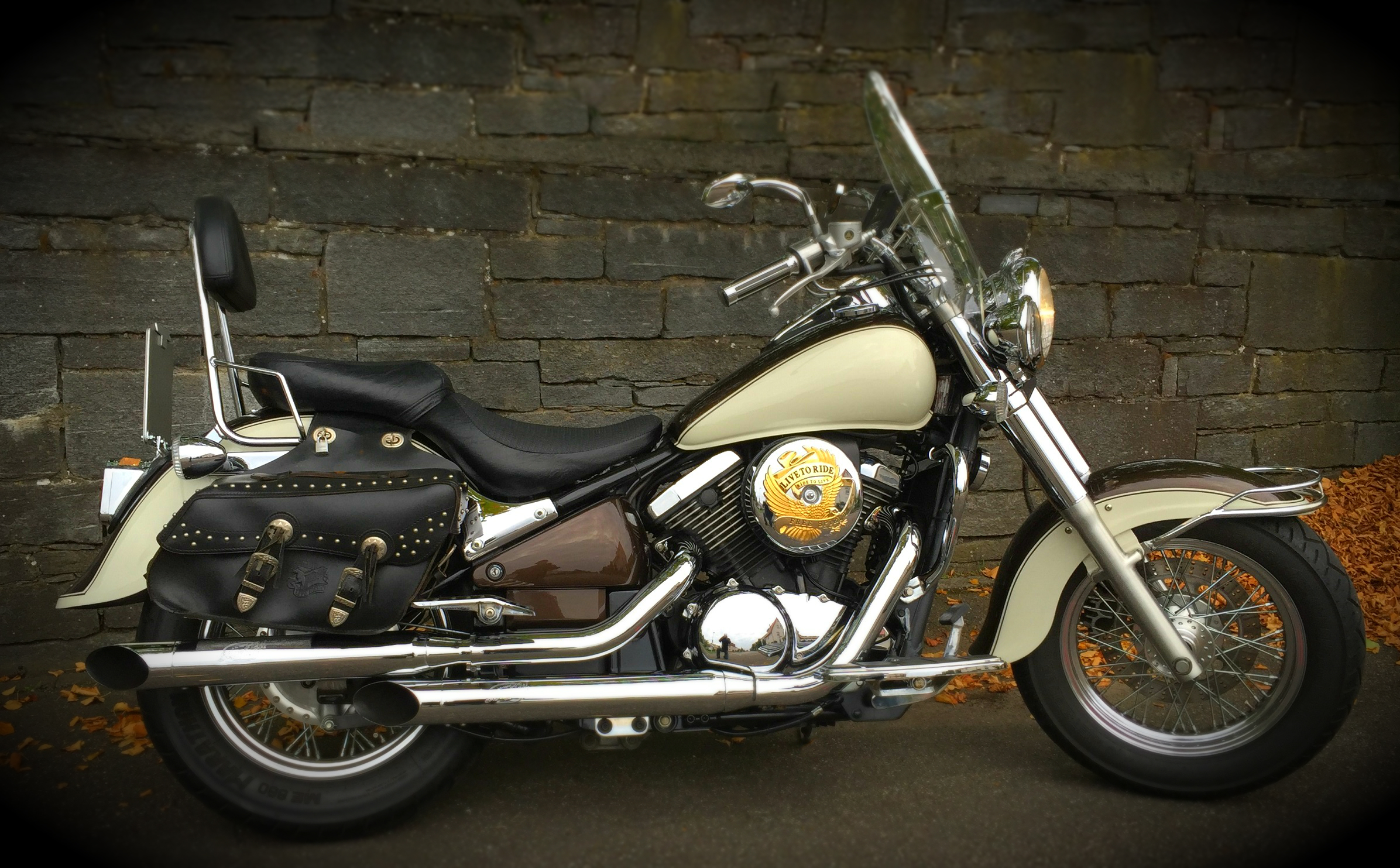 Original VN 800 Classic mit geändertem Lacksatz u. Silvertail Auspuff